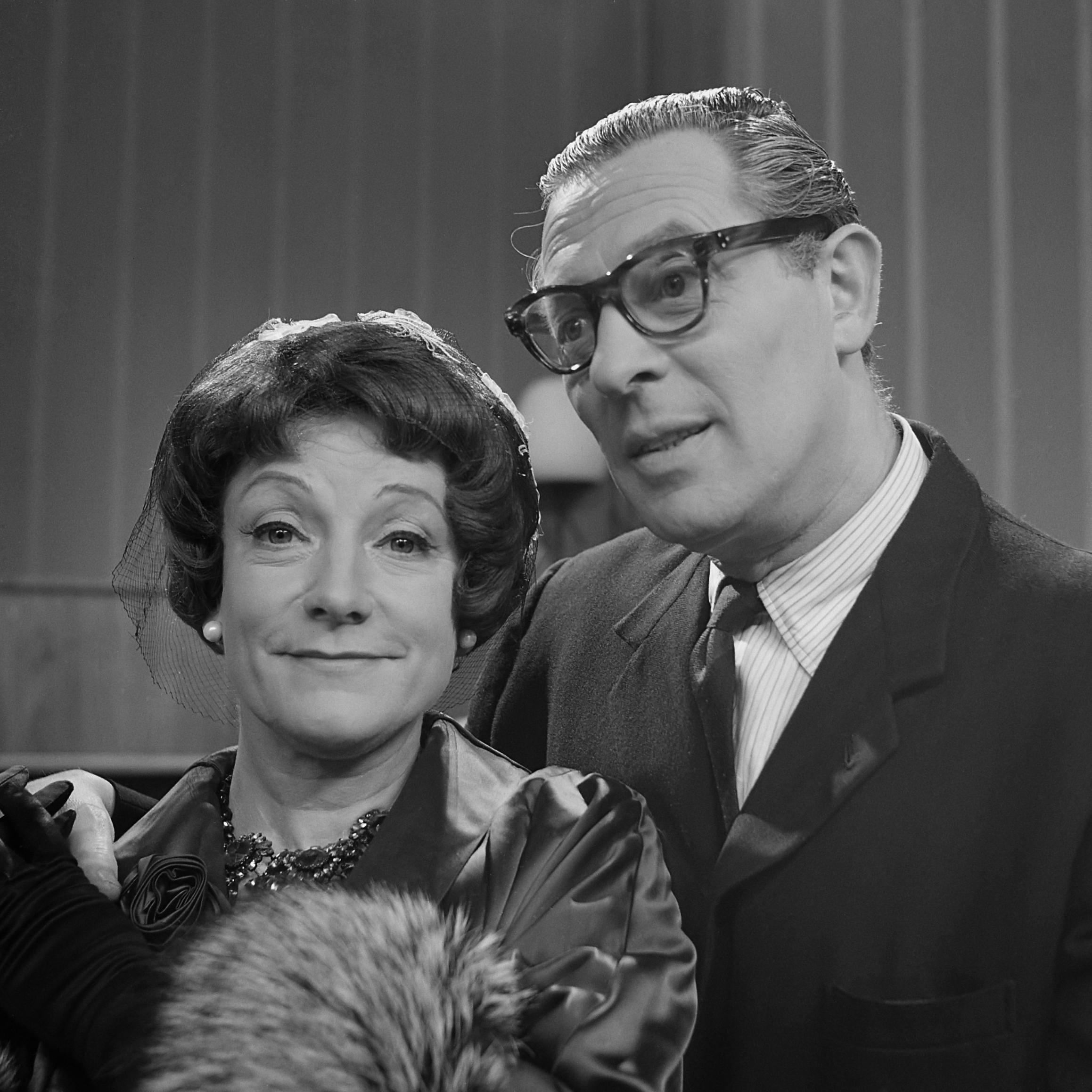 TV Op zoek naar Garrow, Louis Borel en Georgette Hagedoorn 12 juli 1962